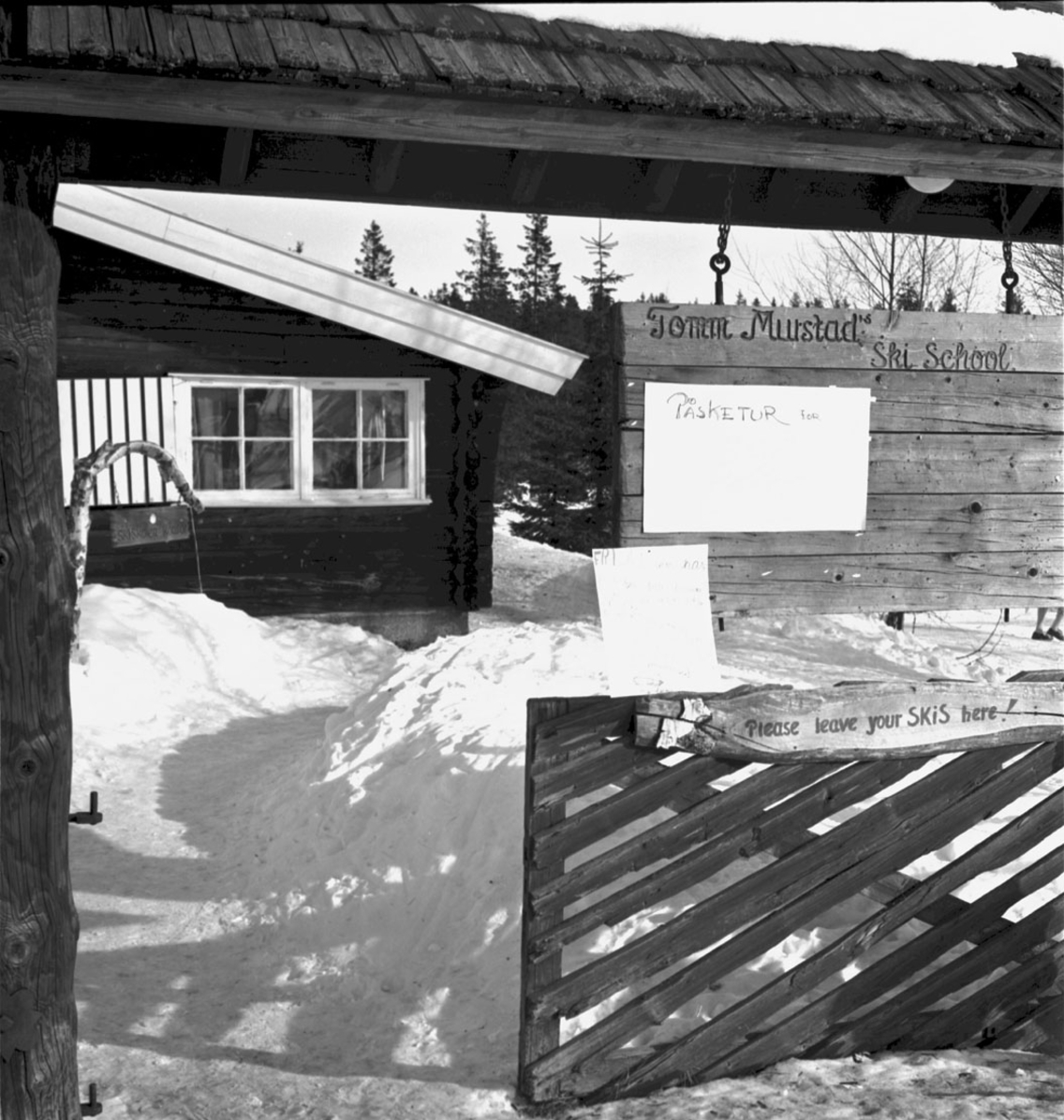 Tomm Murstad skiskole